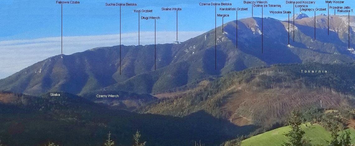 Widok z górnej stacji wyciągu narciarskiego Bachledzka Dolina w Magurze spiskiej